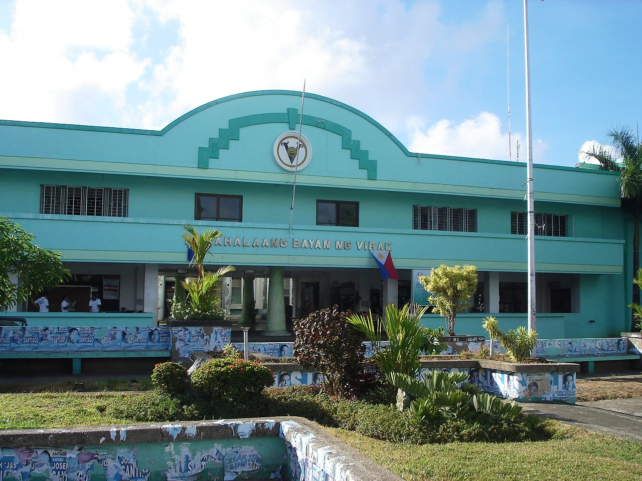 Virac, Catanduanes, Philippines